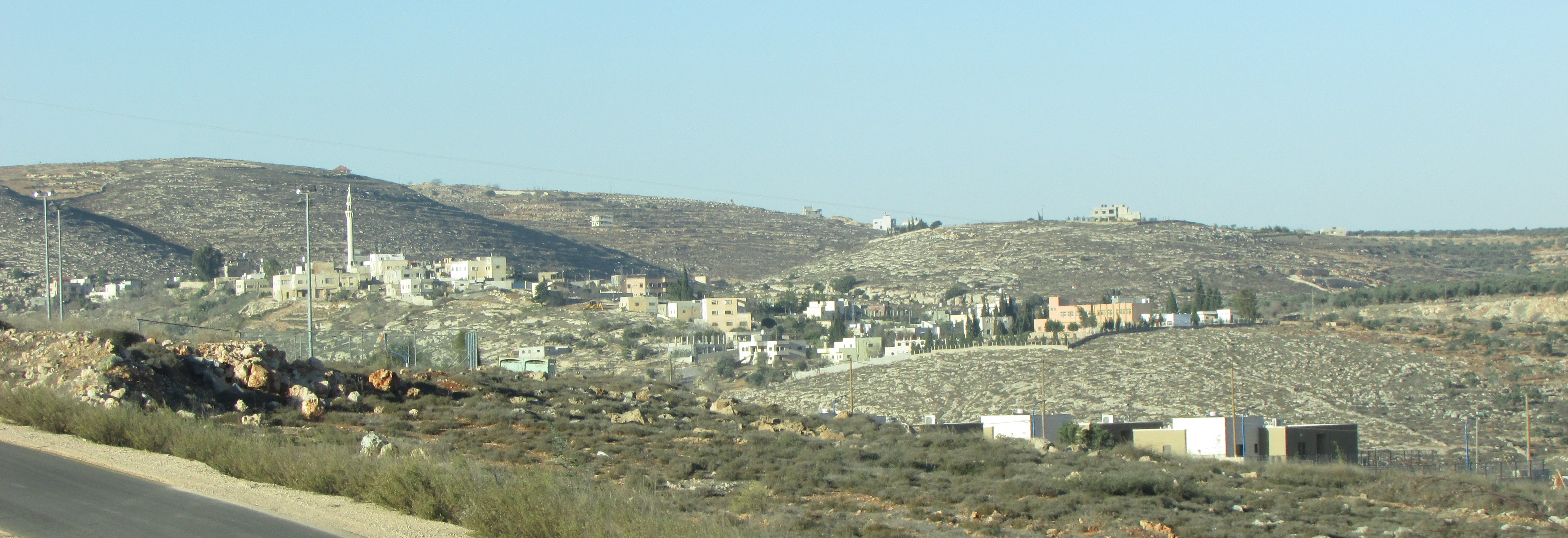 Jalud